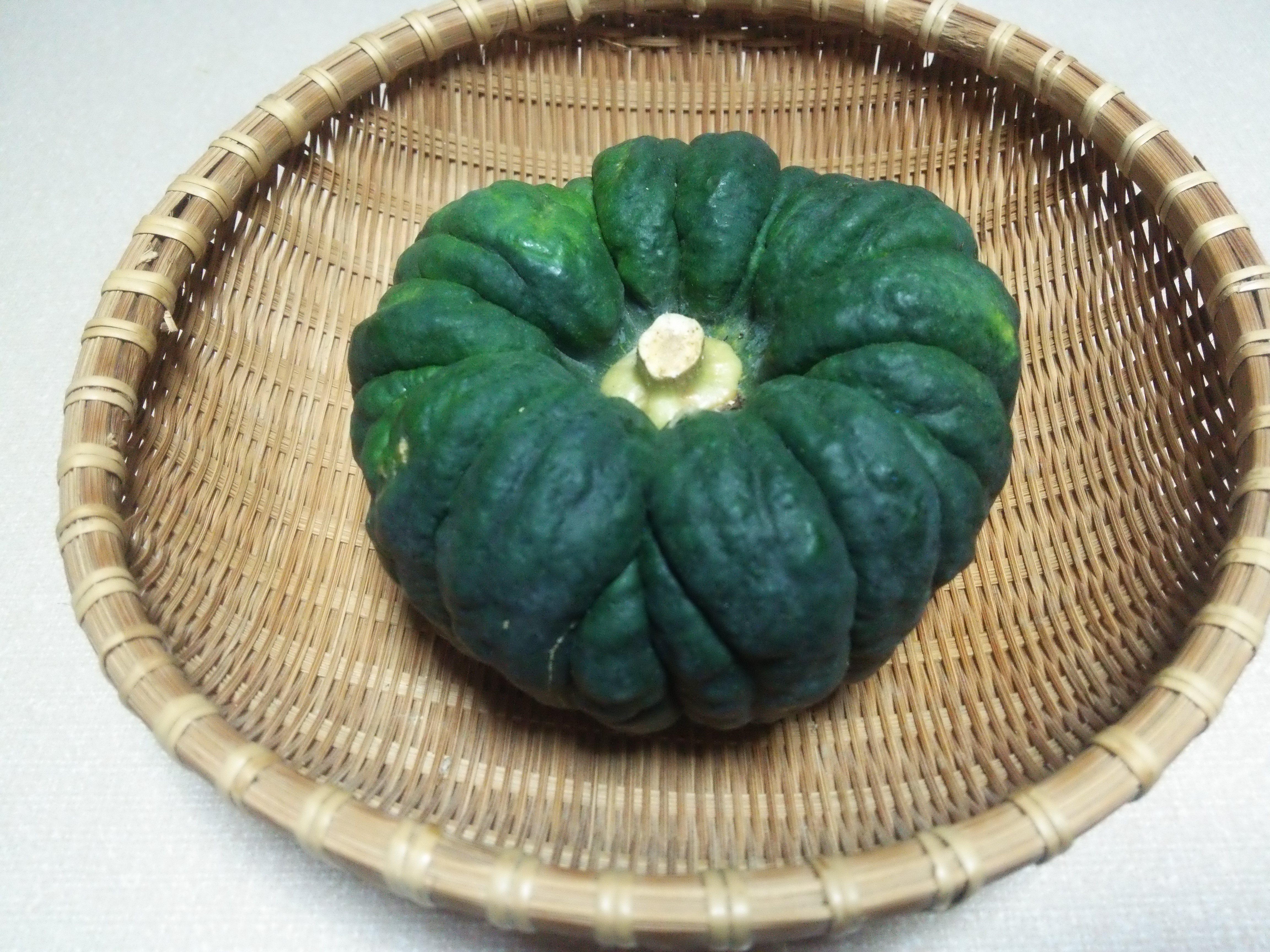 大和在来野菜「小菊南瓜」